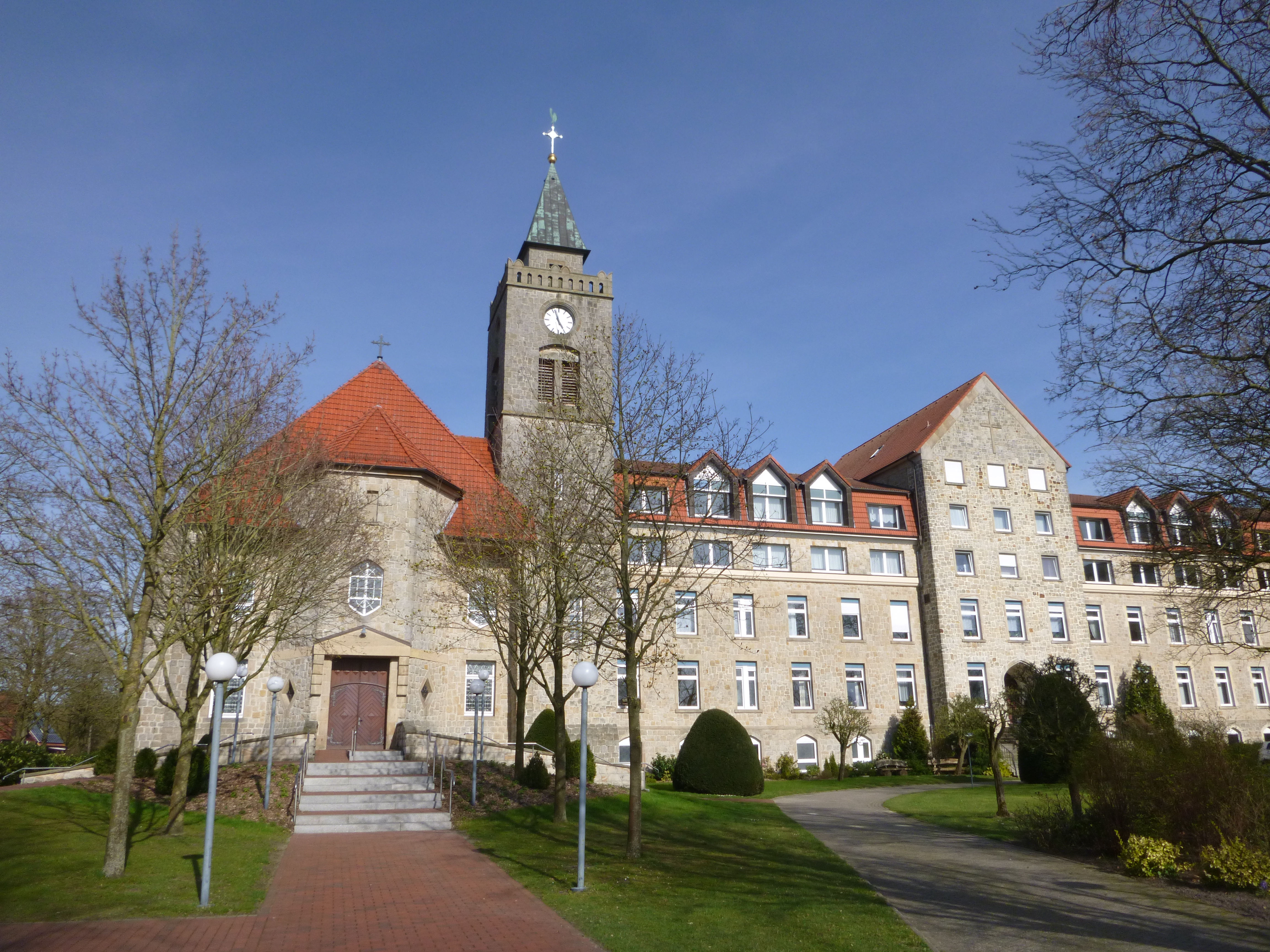 Gimnazio Leoninum en Handrup, Malsupra Saksio, Germanio